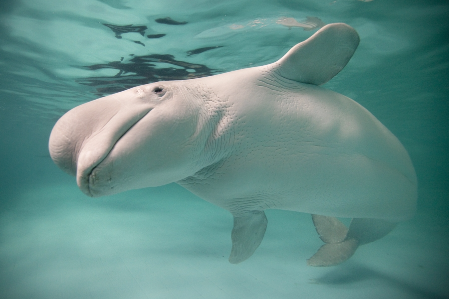 Beluga whale